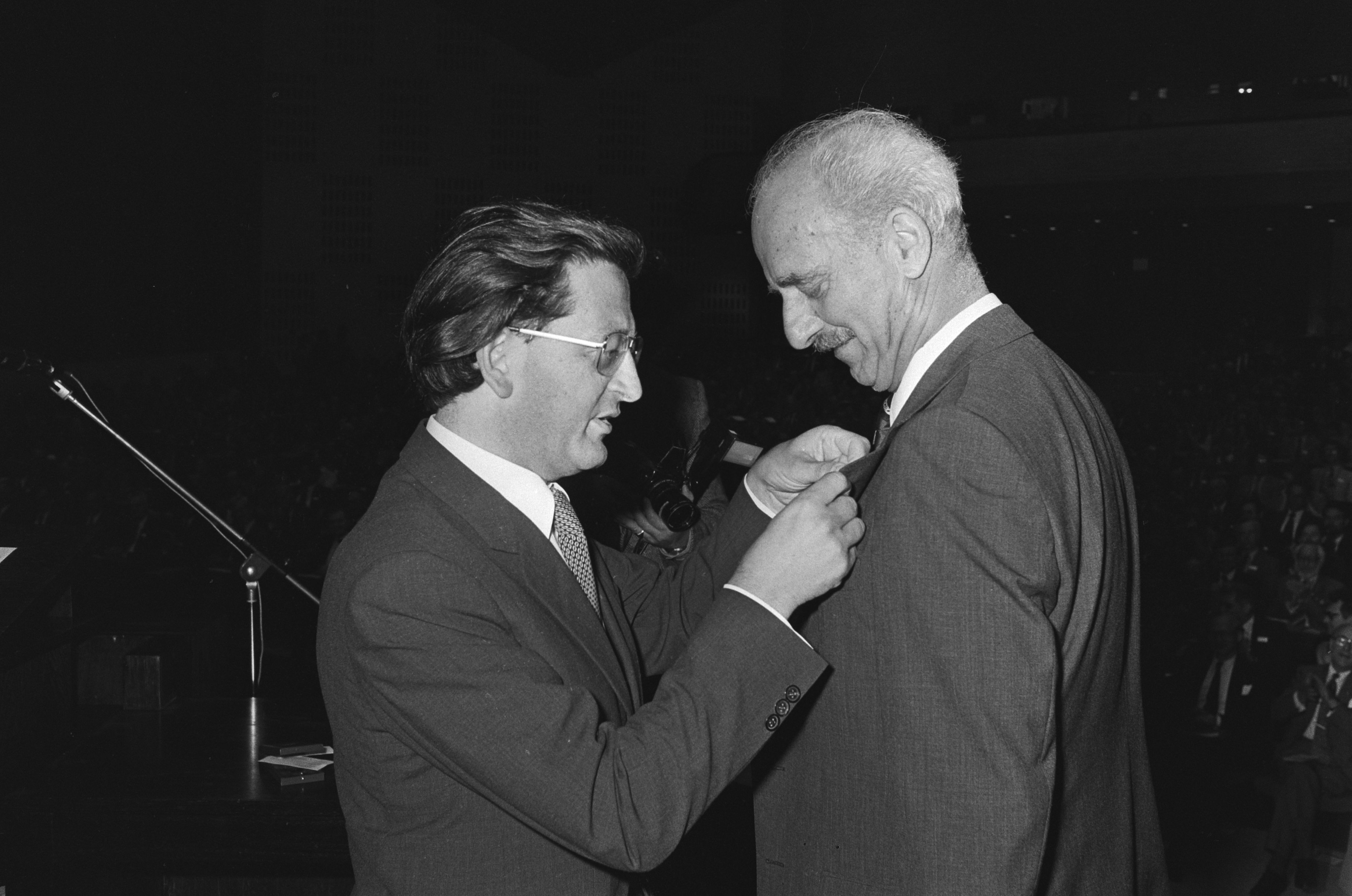 Collectie / Archief : Fotocollectie Anefo Reportage / Serie : Prins Bernhard aanwezig bij het congres ter gelegenheid van het 50 jarig bestaan van het Nederlands Economisch Instuut (NEI) in Rotterdam Beschrijving : Minister Pais (l) speldt een koninklijke onderscheiding op bij prof. dr. L.H. Klaassen Datum : 4 september 1979 Locatie : Rotterdam, Zuid-Holland Trefwoorden : congressen, jubilea, ministers, onderscheidingen, professoren Persoonsnaam : Klaassen, L.H., Pais, Arie Fotograaf : Suyk, Koen / Anefo Auteursrechthebbende : Nationaal Archief Materiaalsoort : Negatief (zwart/wit) Nummer archiefinventaris : bekijk toegang 2.24.01.05 Bestanddeelnummer : 930-4242